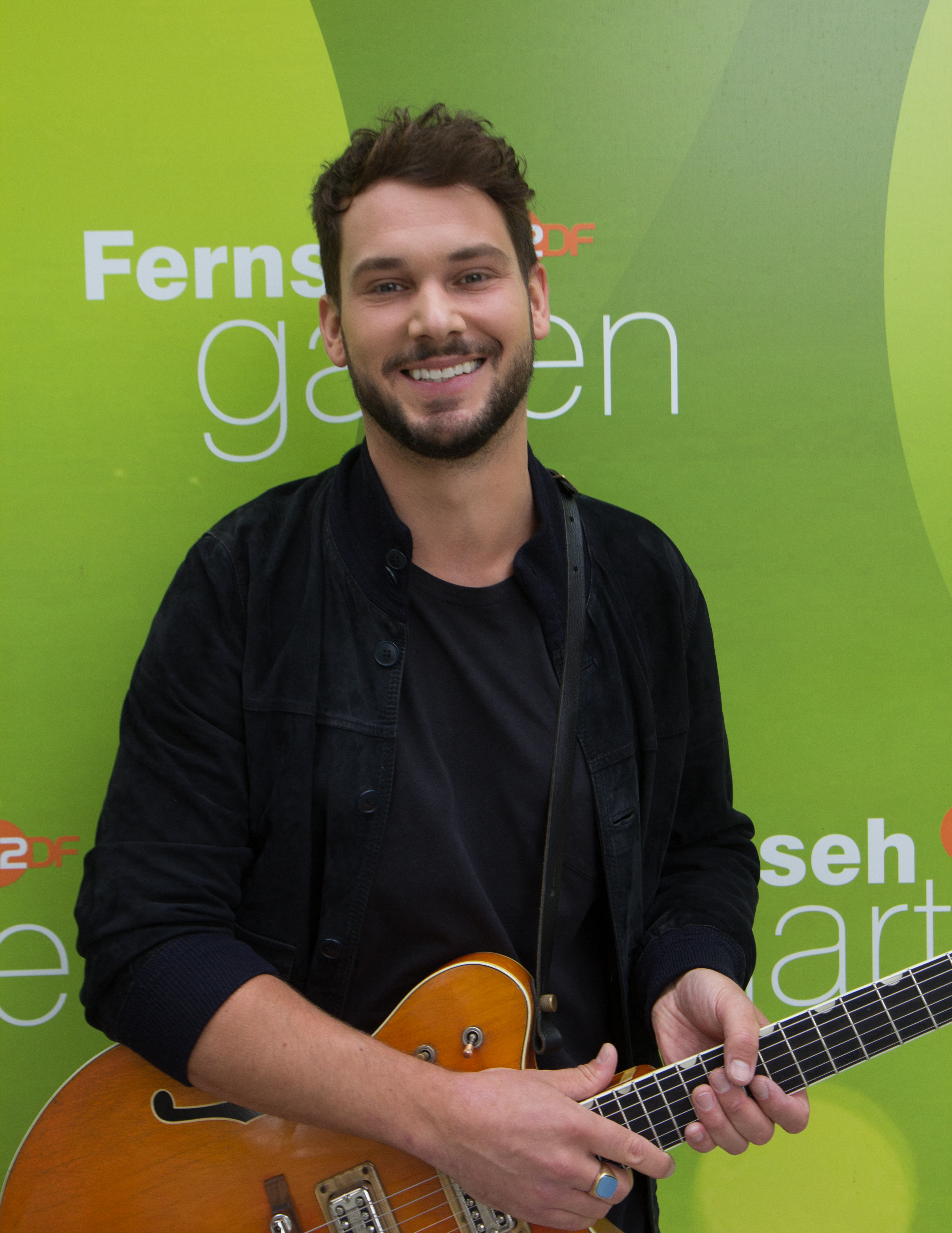 Robert Redweik als Gast im ZDF-Fernsehgarten am 2. September 2018 in Mainz.